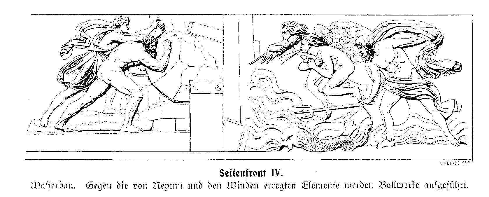 Der Münzfries von Johann Gottfried Schadow, Teil 6.